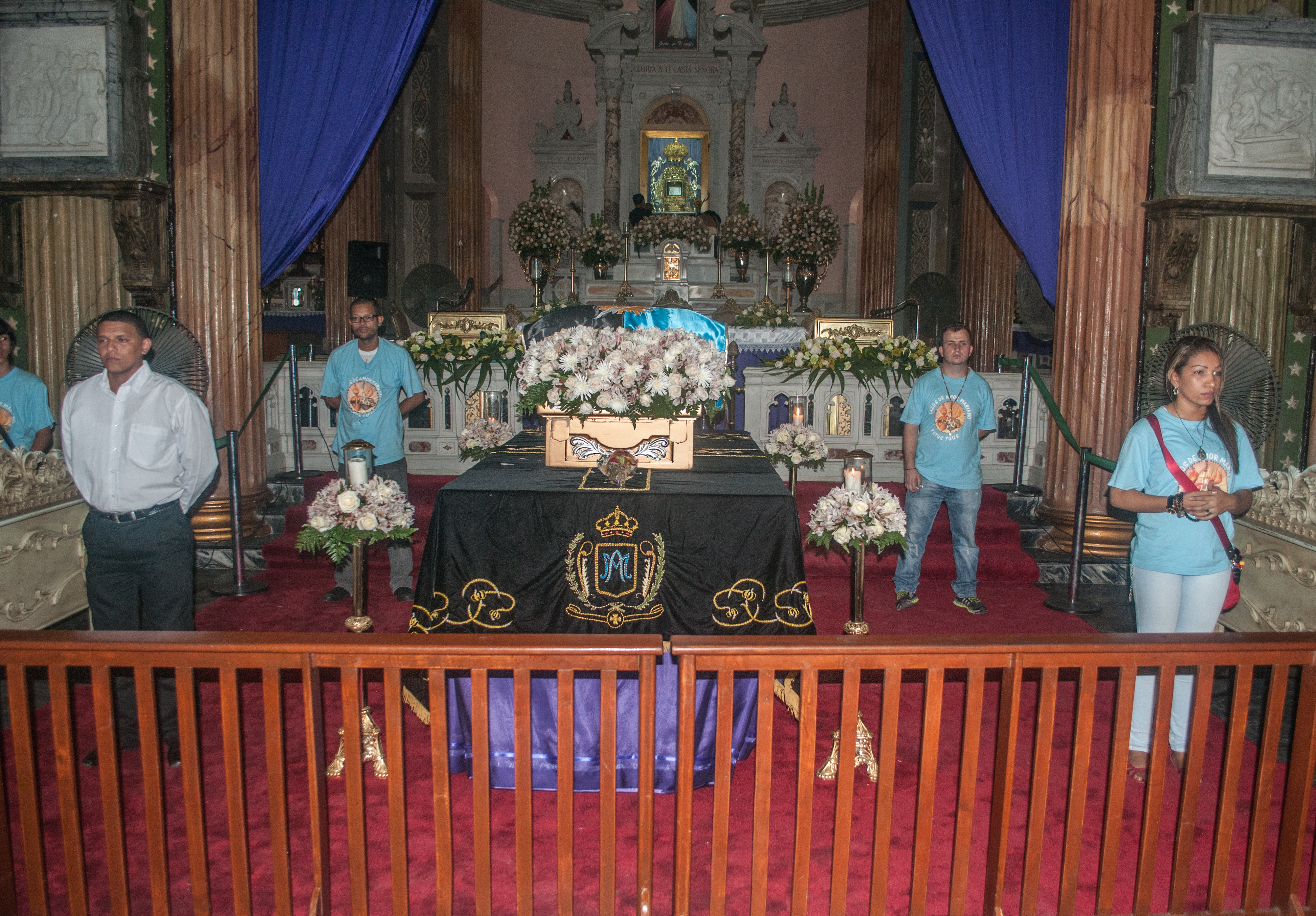 Velorio de exhumacion de restos de Felipe Pirela, Basílica de Nuestra Señora de la Chiquinquira, Maracaibo, Venezuela